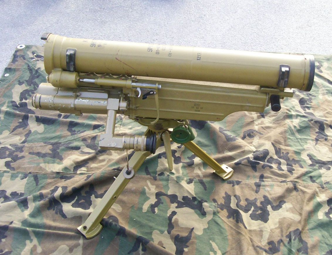 POLK 9K115 Metis